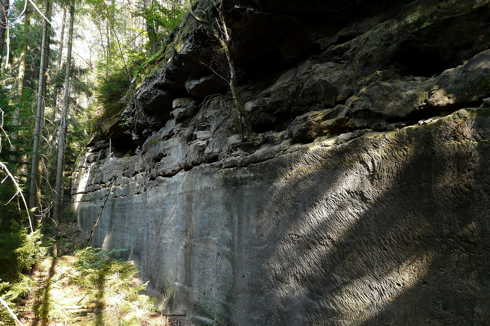 Pískovcová terasa pod Klukou upravená lomem